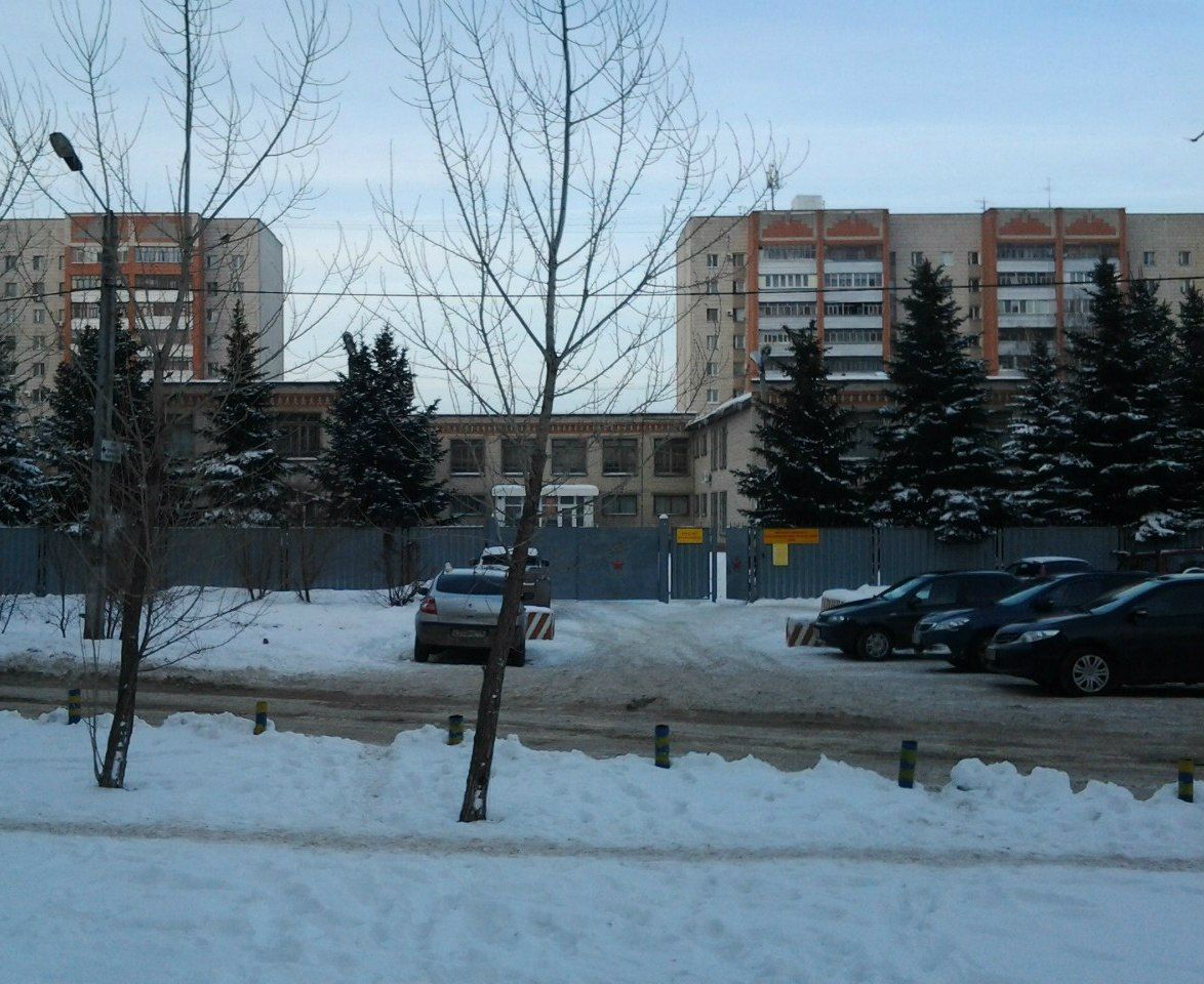 Татарча/tatarça: Казан шәһәре Авиатөзелеш һәм Яңа Савин районнары хәрби комиссариаты бинасы